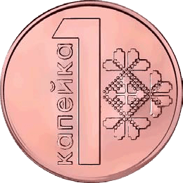 1 копейка Республики Беларусь образца 2009 года (реверс)